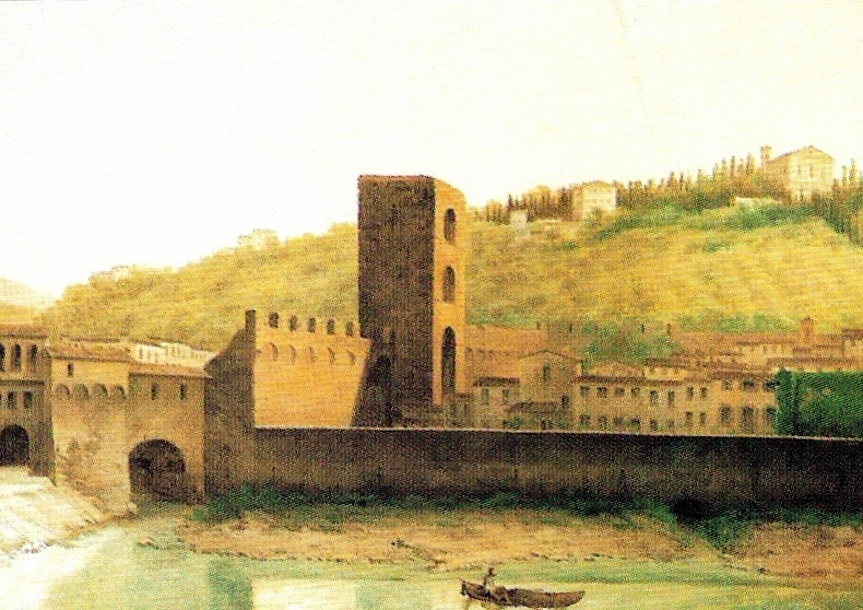 Porta San Niccolò (interno)